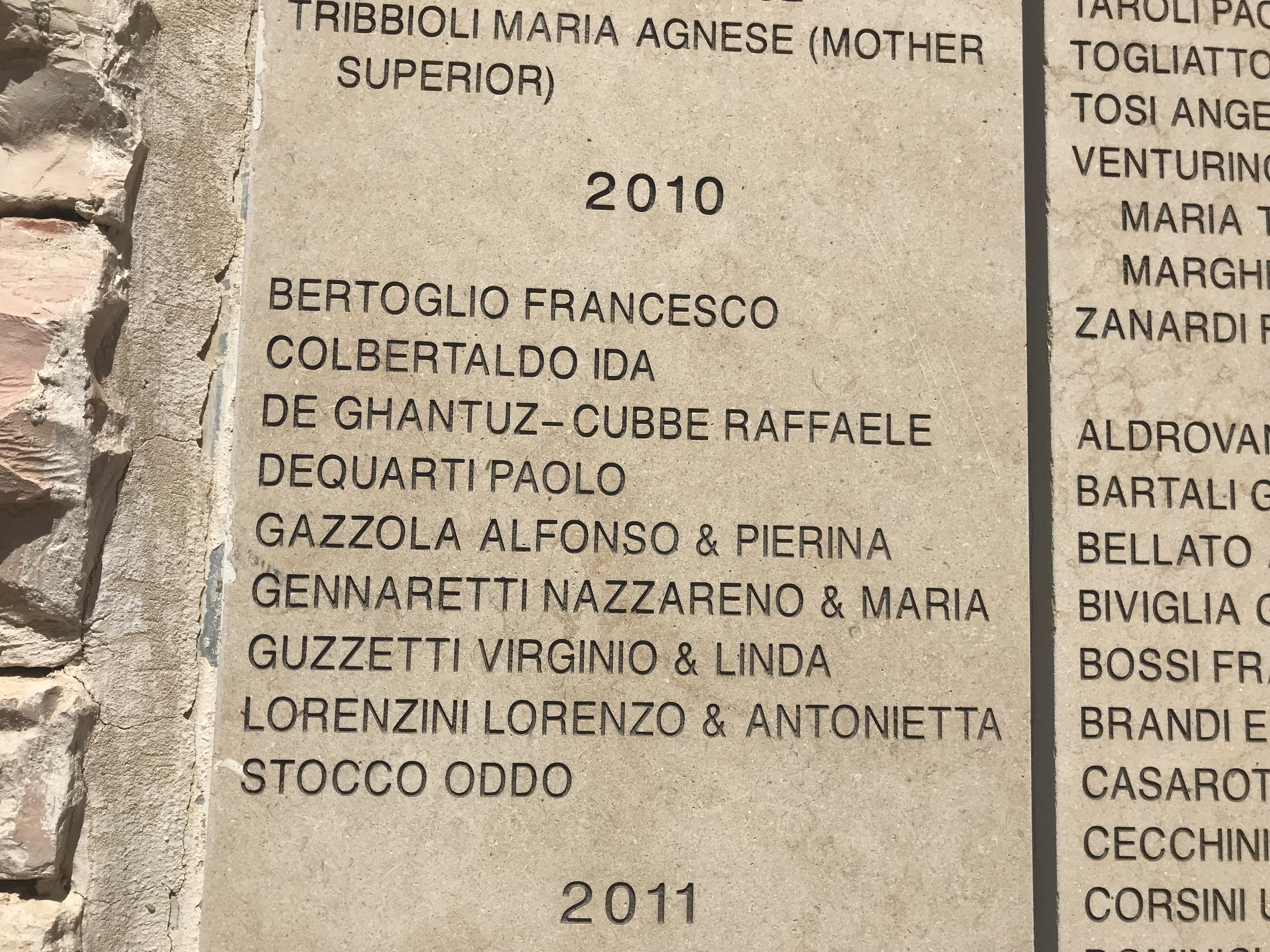 שמו של רפאל דה גנטוז קובה על קיר הכבוד לחסידי אומות העולם, בגן חסידי אומות העולם שביד ושם